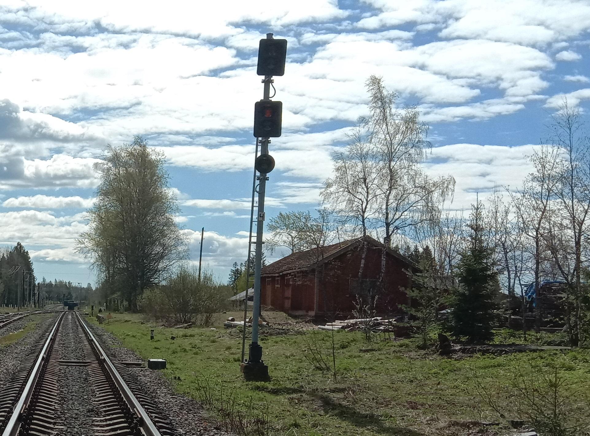 Кааламо